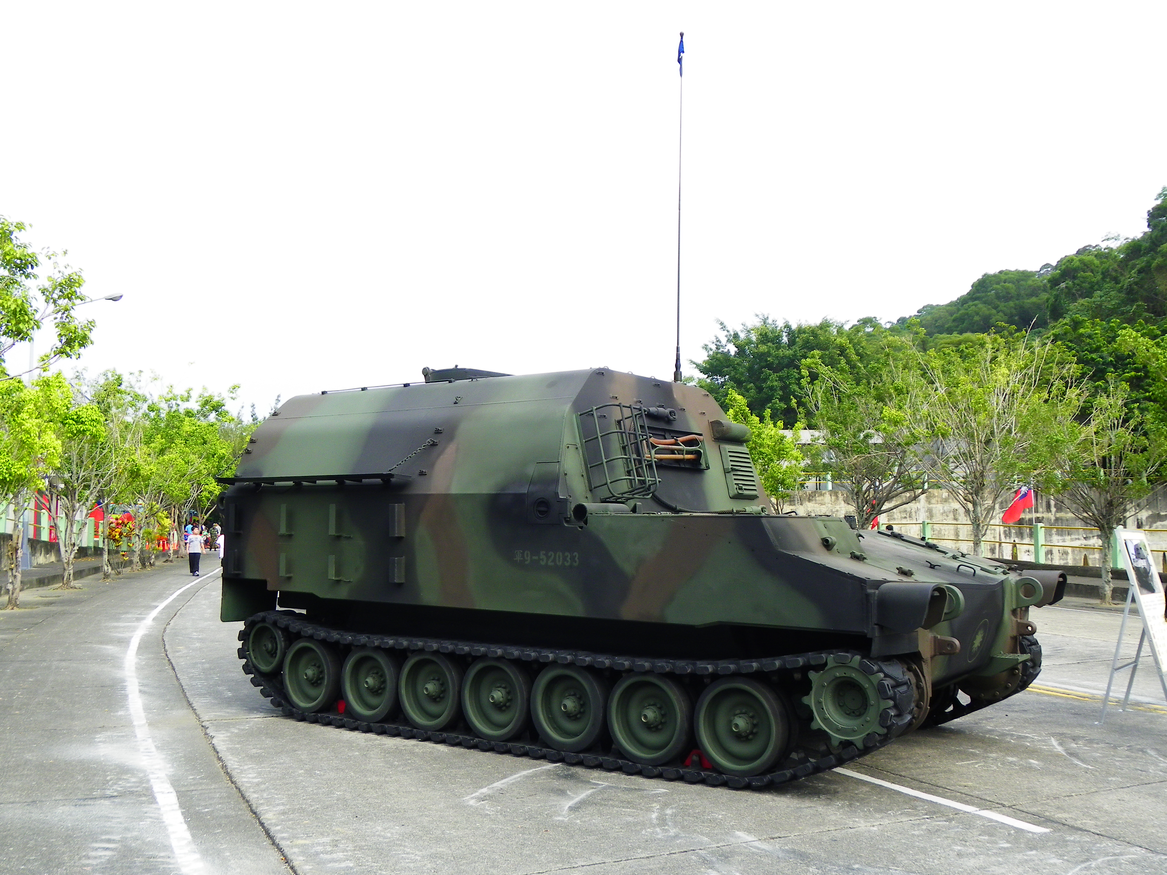 2012年兵整中心營區開放活動，岳崗路展示之中華民國海軍陸戰隊M992射擊指揮車。